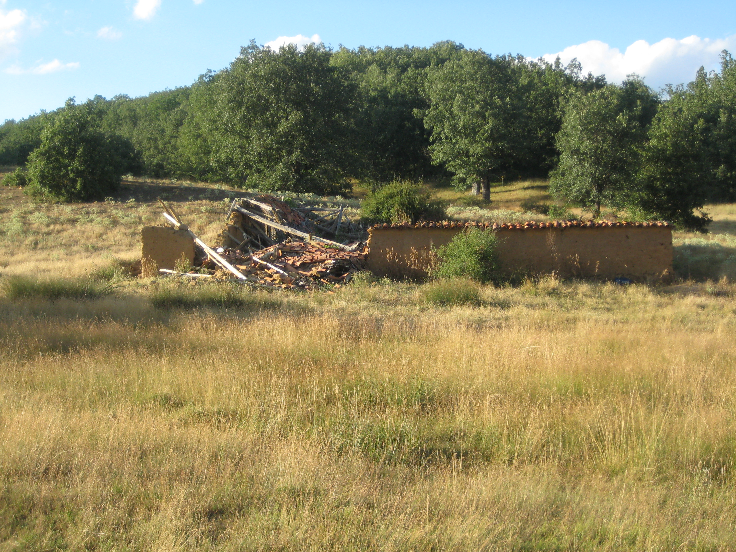 CorraletaValmoroJulio2013